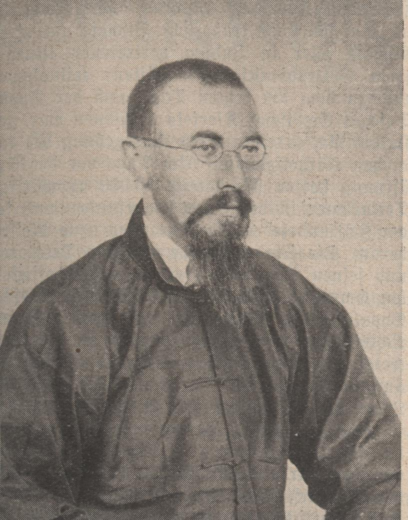 Bischof Karl Christian Weber SVD als Pater in China